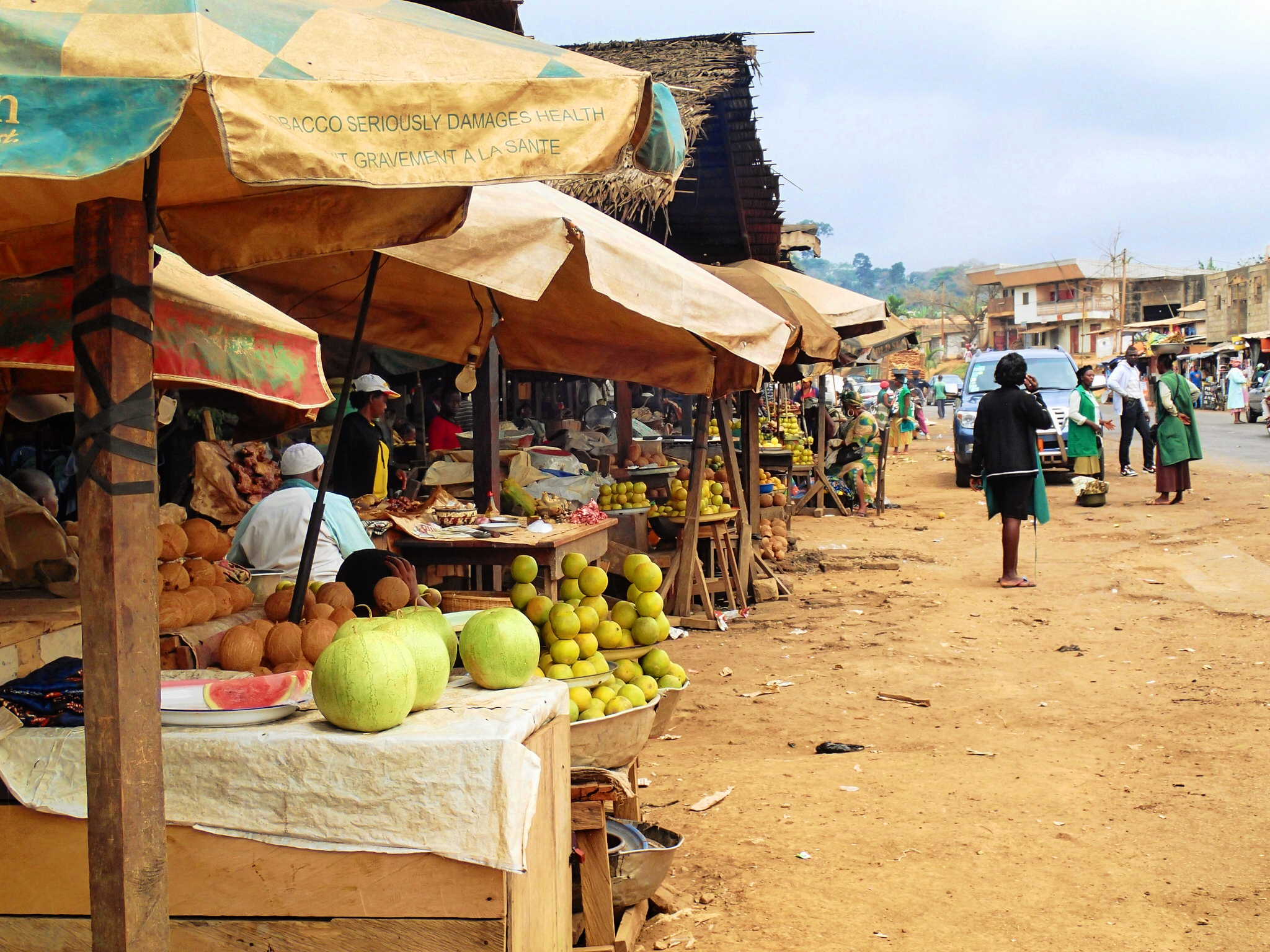 Makenene market, Cameroon